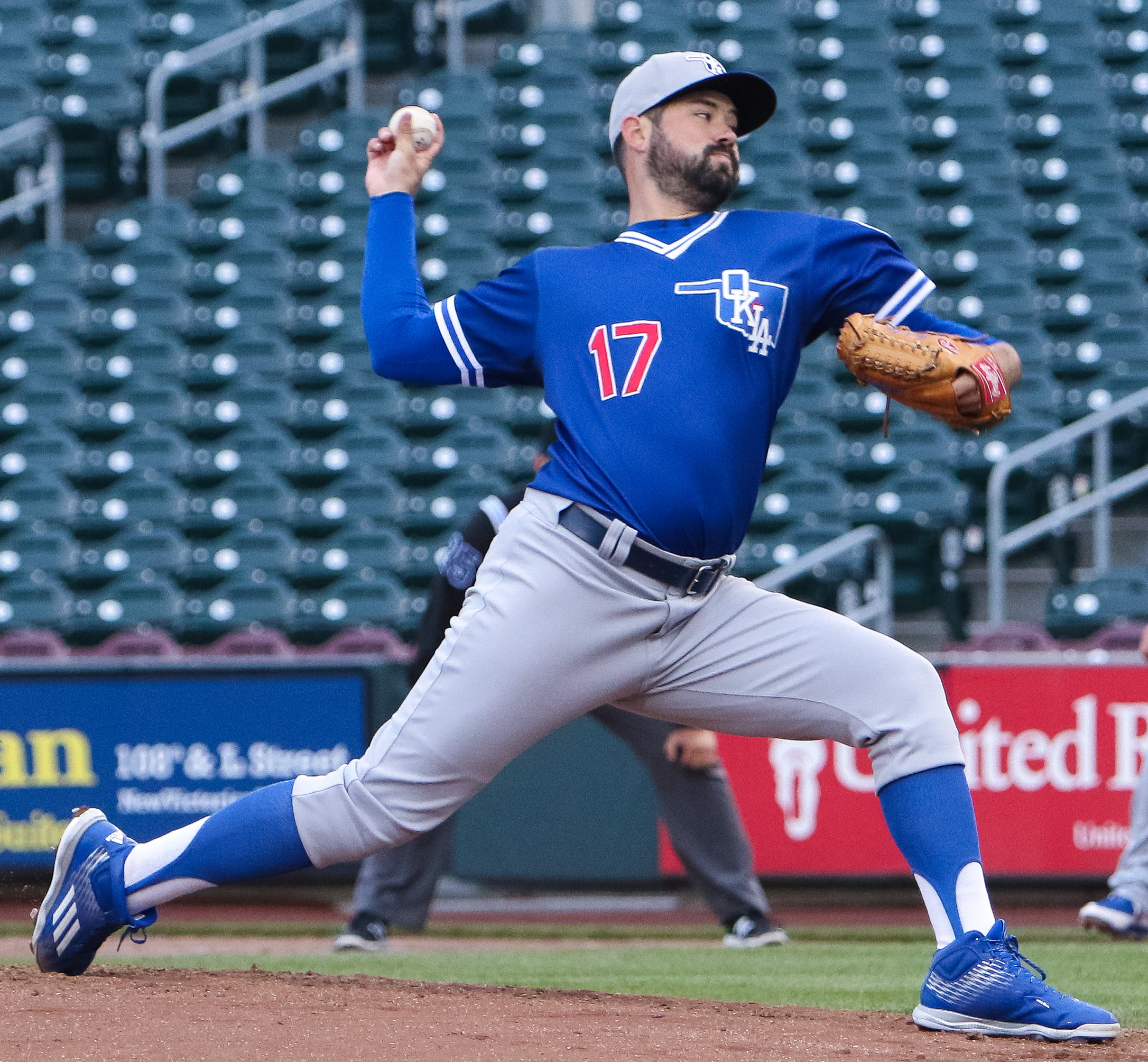 Zach Lee